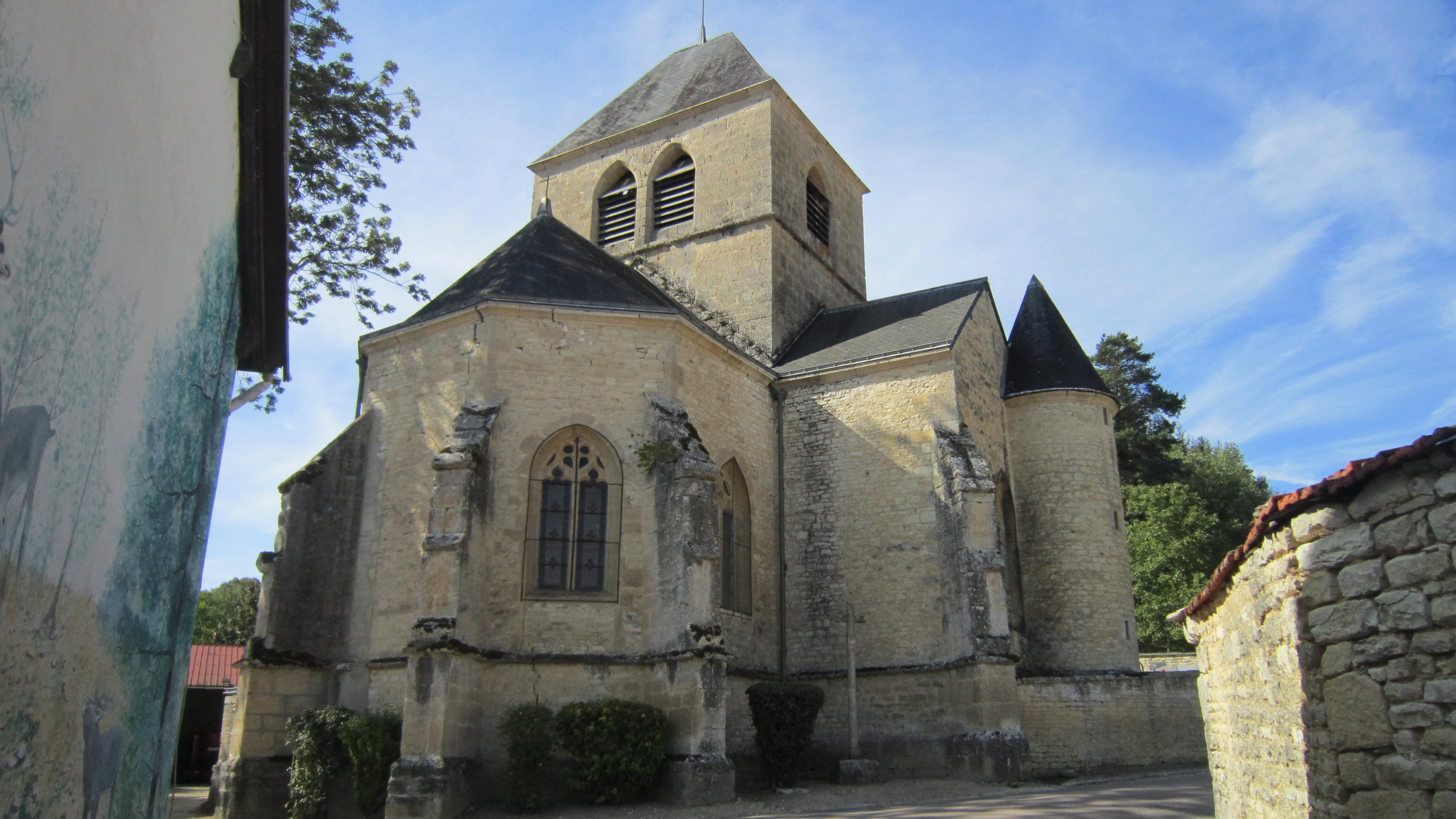 Eglise de Channais (Côte-d'Or)